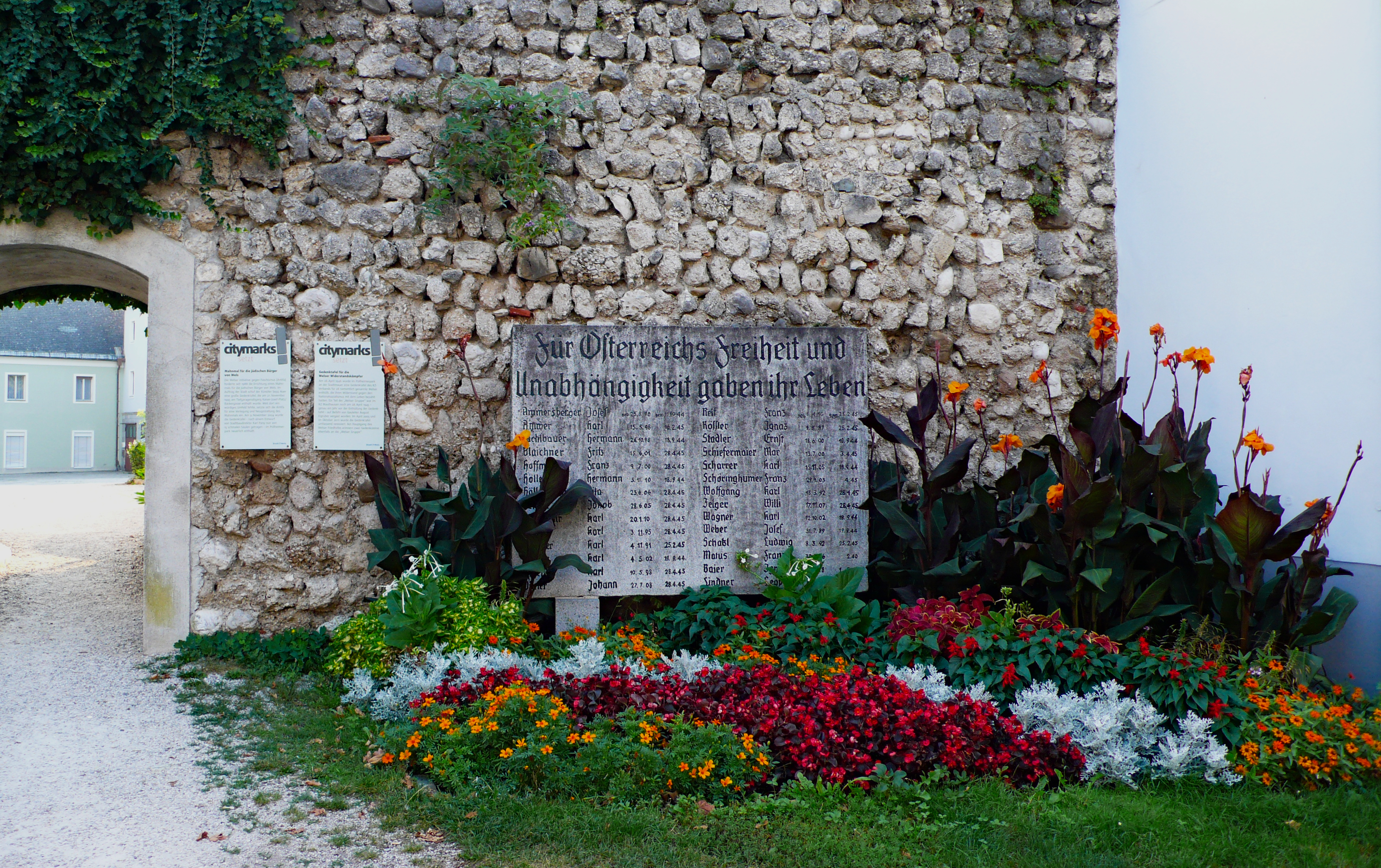 Gedenktafel für die Welser Widerstandskämpfer, Pollheimer Park, Wels, Oberösterreich.